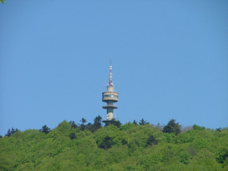 TV toranj na Sljemenu, Medvednica, Zagreb